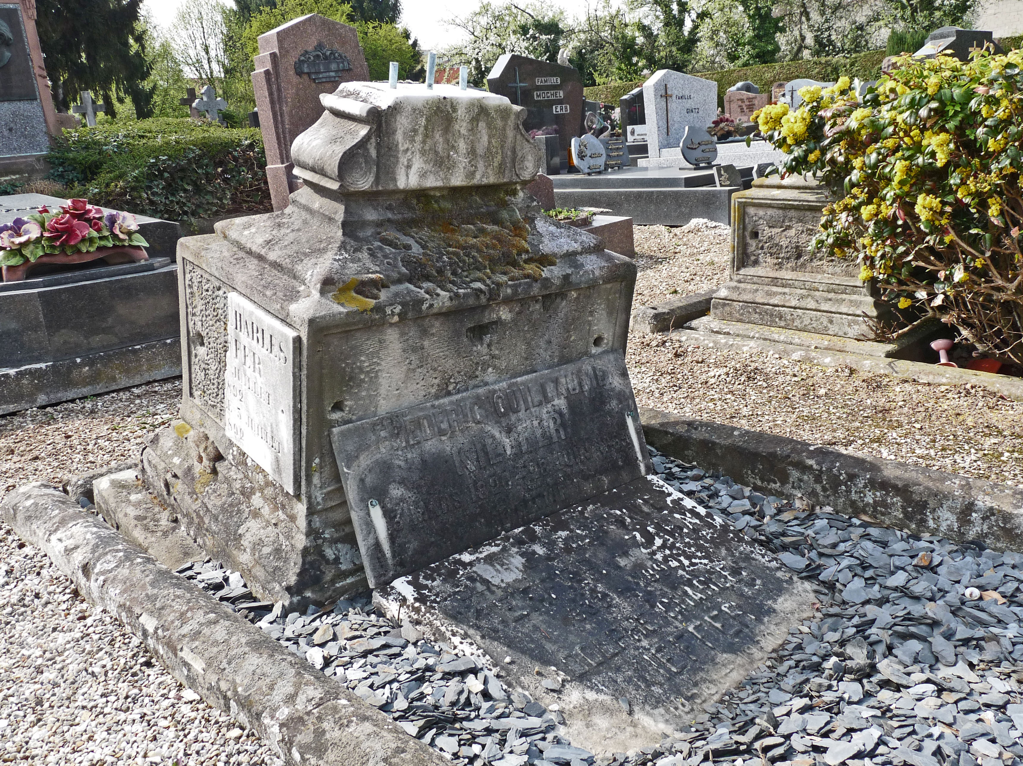 Tombe de Fritz Kieffer (1854-1933) au cimetière Saint-Gall de Koenigshoffen (Strasbourg).